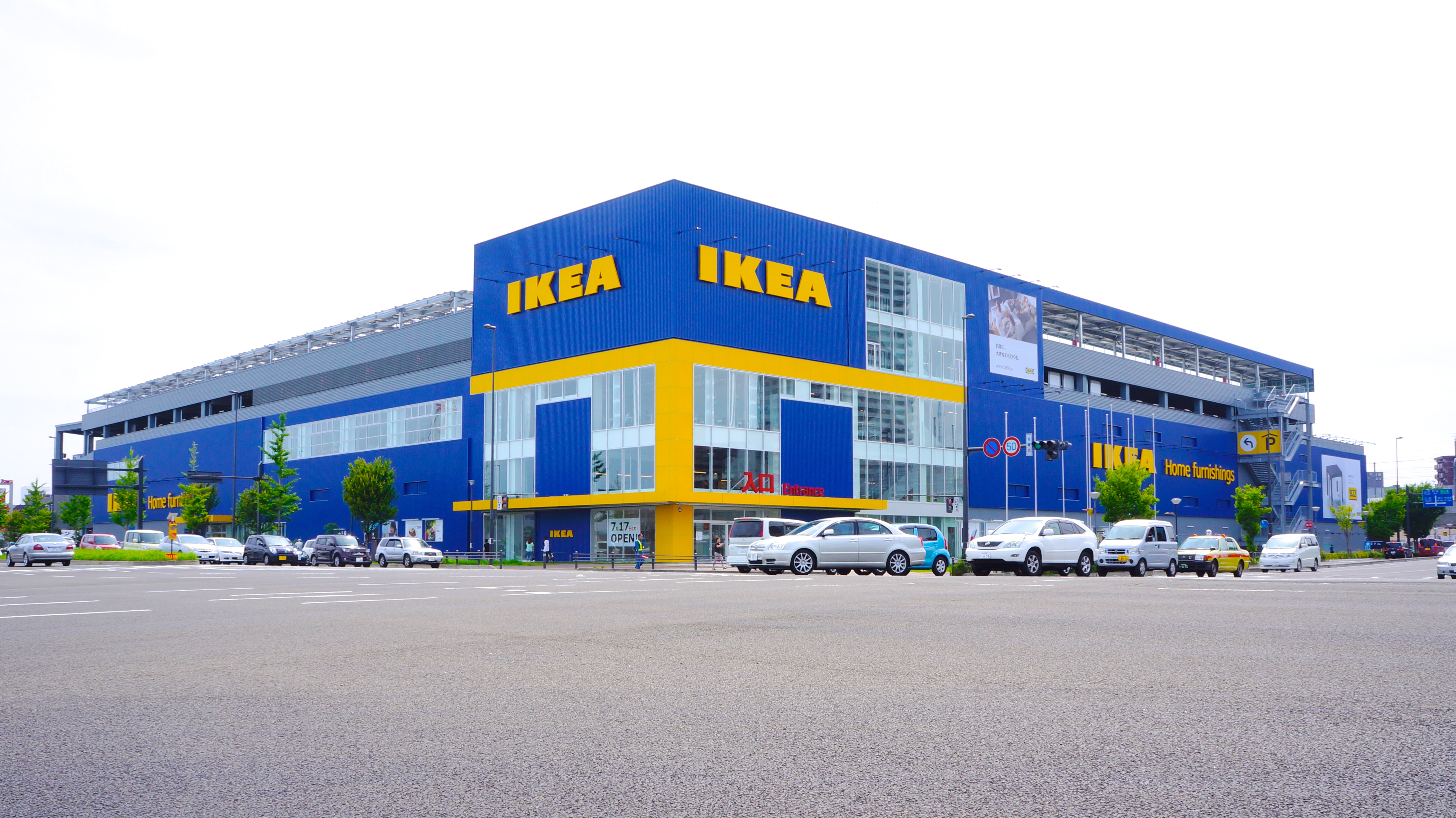 IKEA仙台